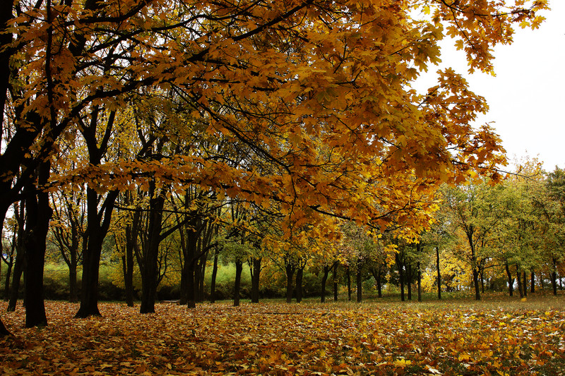 осень на Украине